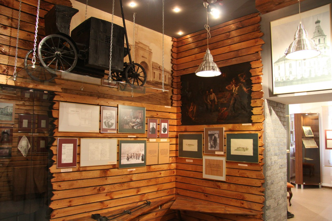 Дом комендантов Омской крепости: улица Достоевского, 1, Омск, Омская область